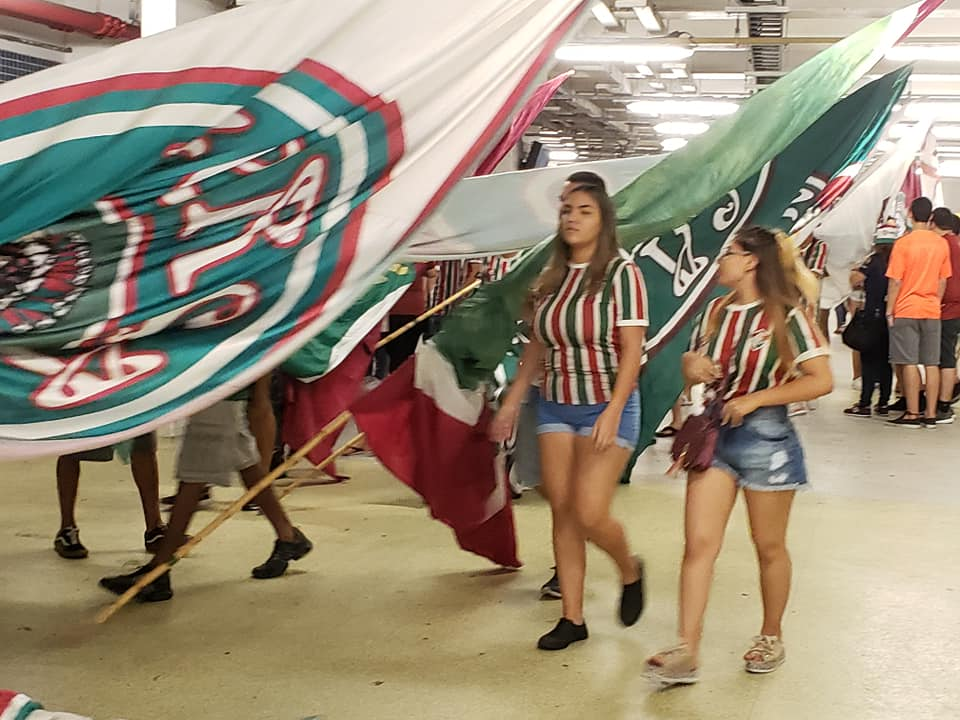 Torcida do Fluminense Footbal Club no corredor do Estádio do Maracanã antes do empate do clube por 0 a 0 em 4 de dezembro de 2019, perante 39.965 torcedores entrando com bandeiras.